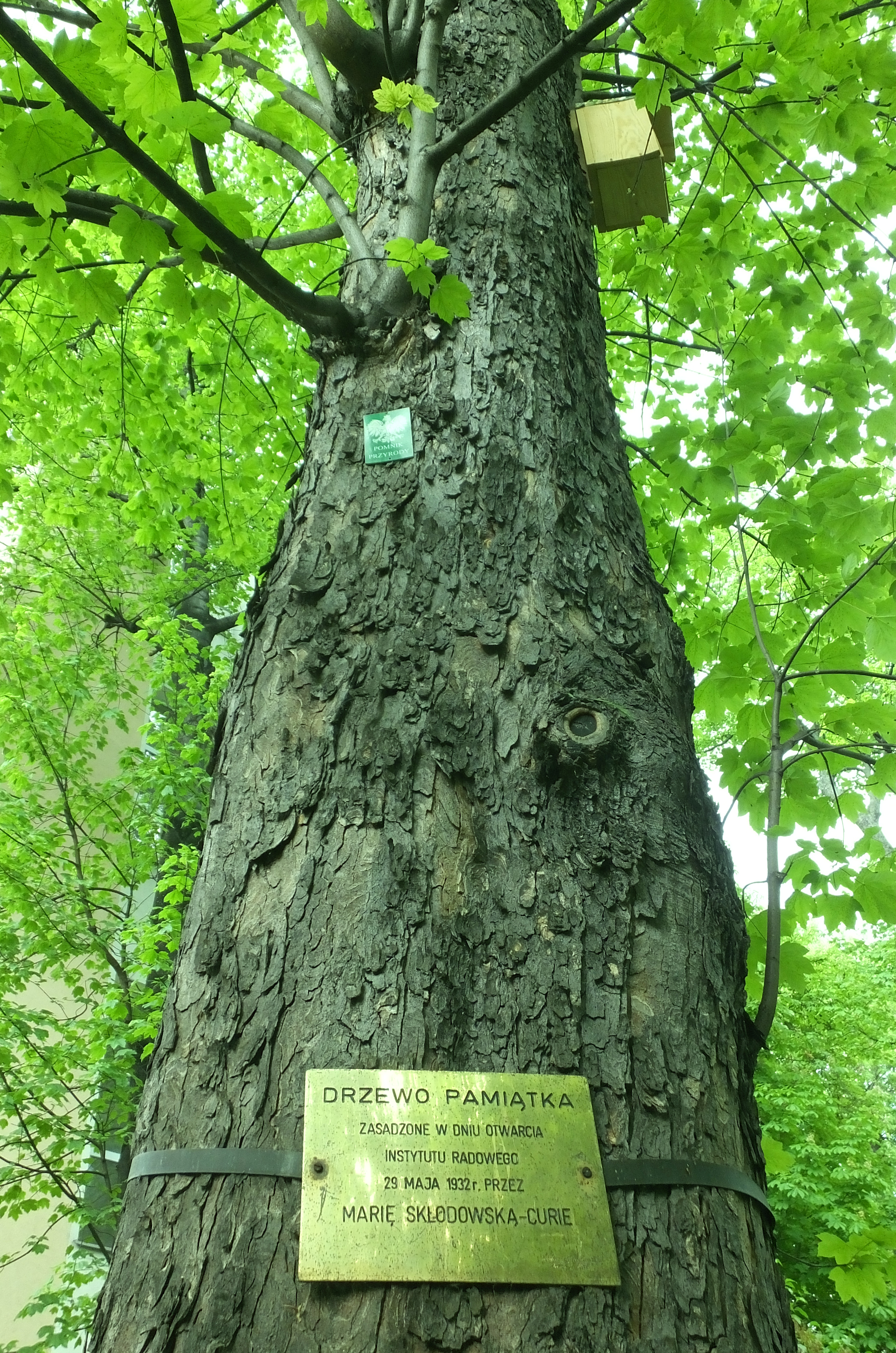 Jawor "Maria" zasadzony w Warszawie przy ul. Wawelskiej 15 przez Marię Skłodowską-Curie. Pomnik przyrody